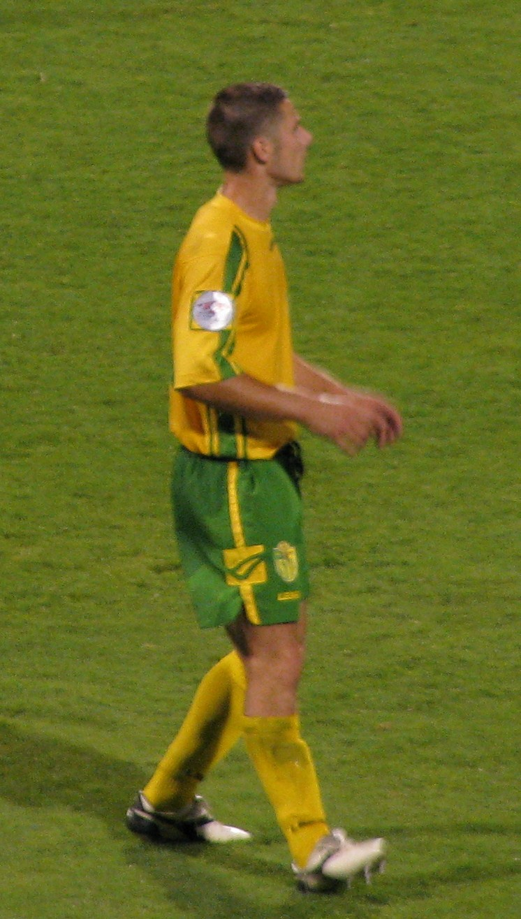 Andro Švrljuga